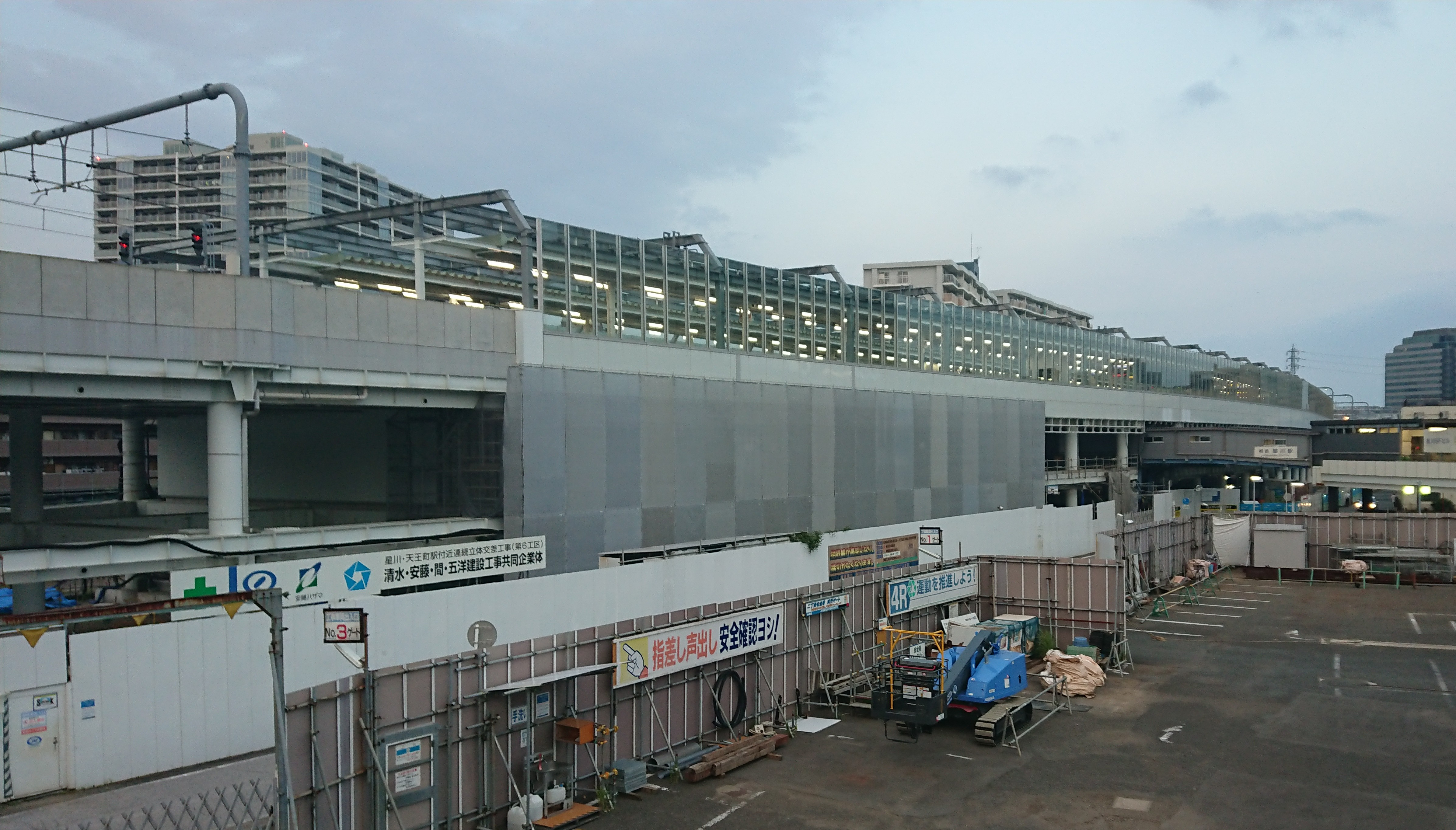 星川駅南側